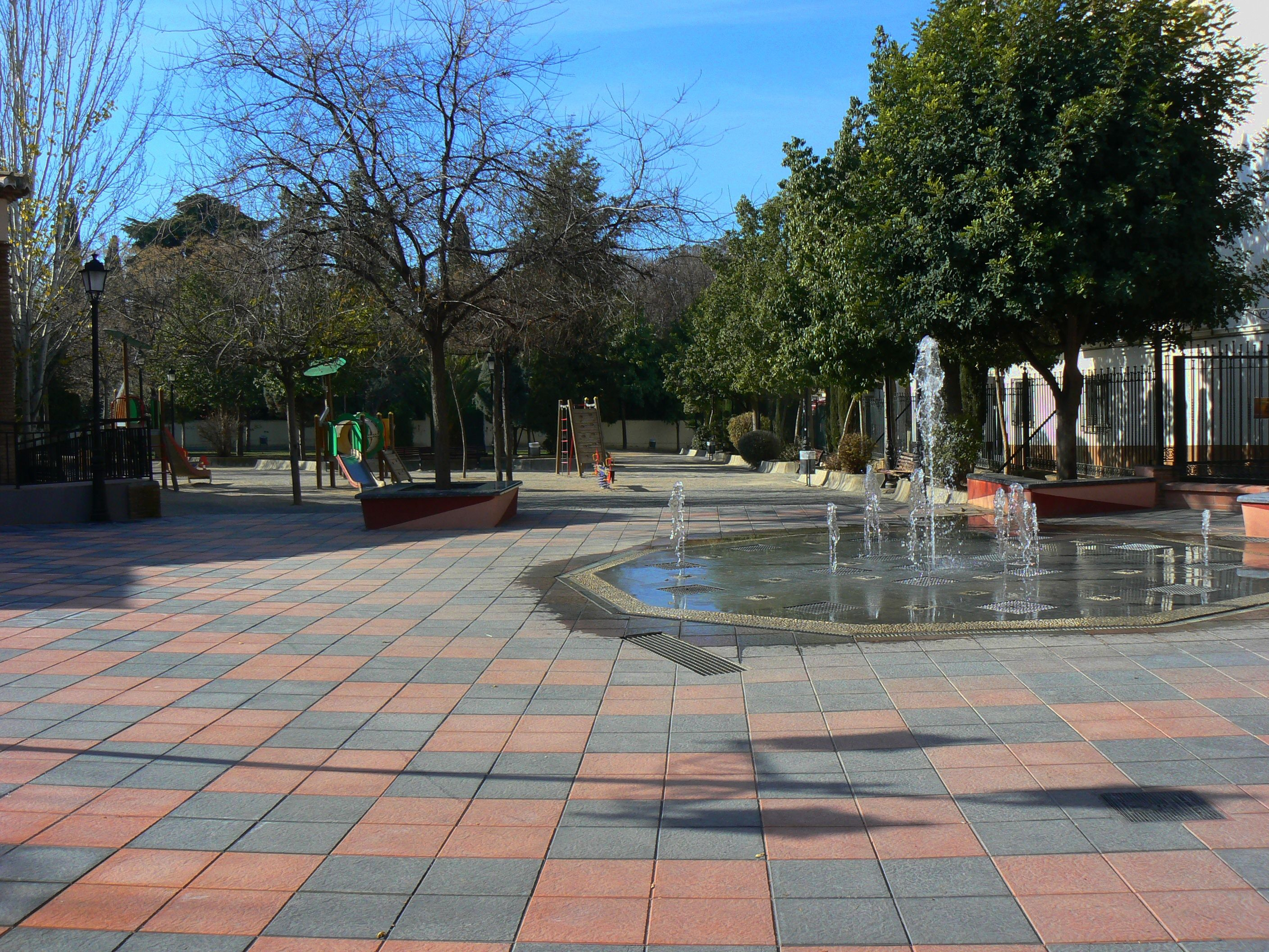 Antigua Plaza Juan Carlos I ahora incluída dentro del Parque de La Encina. En toda la extensión del parque se encuentra prohíbido el jugar a la pelota y montar en bicicleta. Los columpios instalados al fondo de la imagen pueden ser utilizados por los niños pequeños.